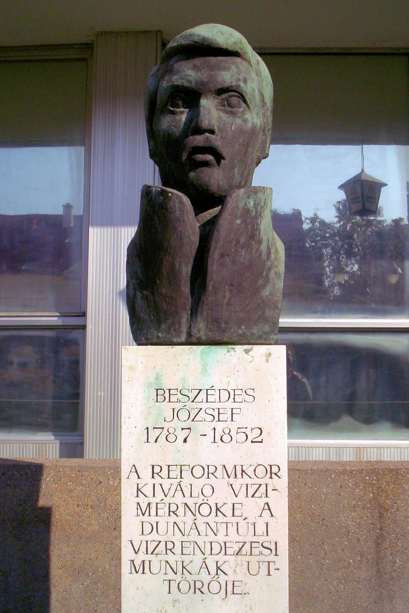 Beszédes József szobra Siófokon (Vígh Tamás alkotása – 1963) – photo taken by the uploader 2005